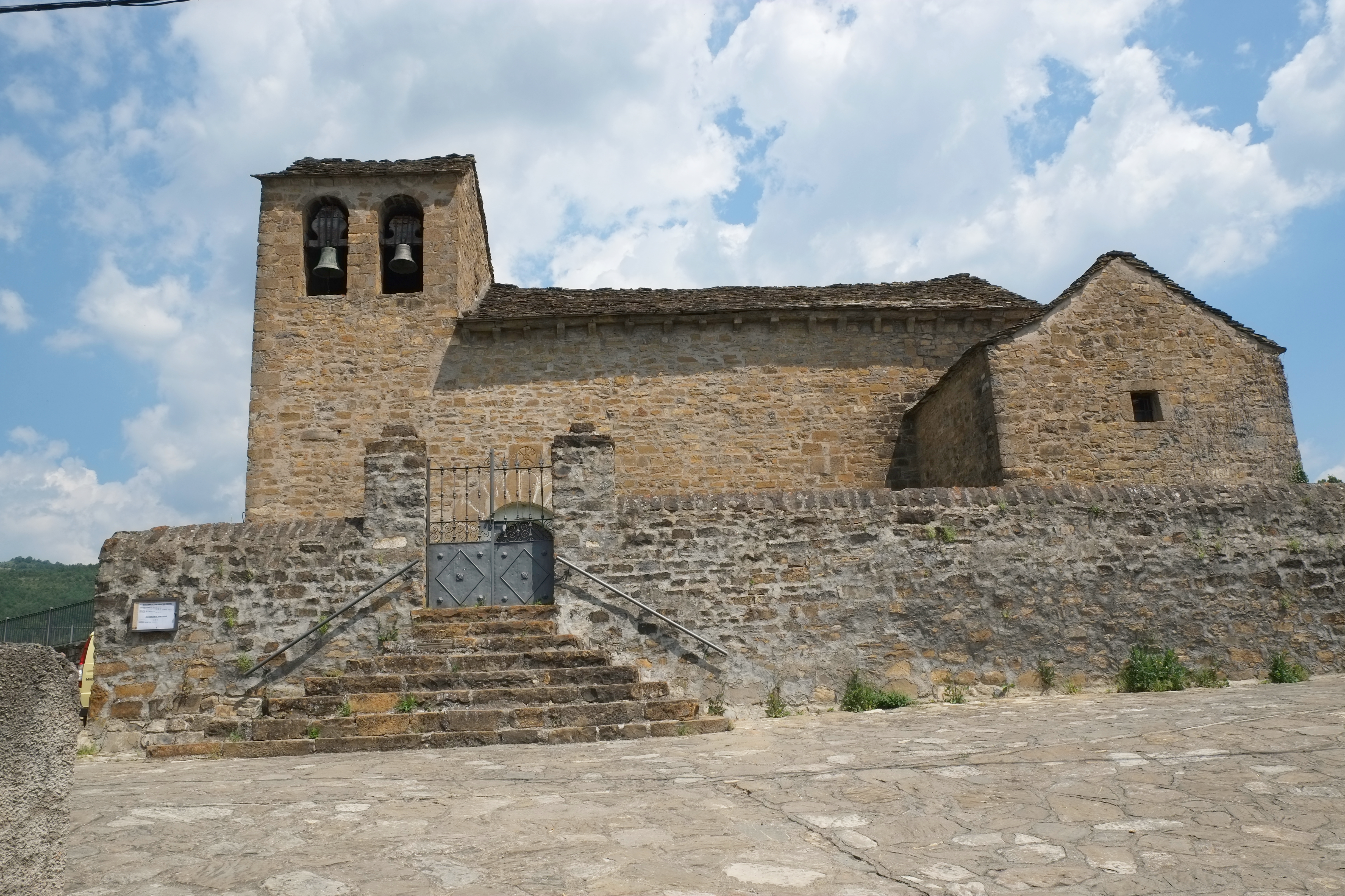 Kirche San Juan Bautista in Aratorés in der Provinz Huesca in Aragonien (Spanien)